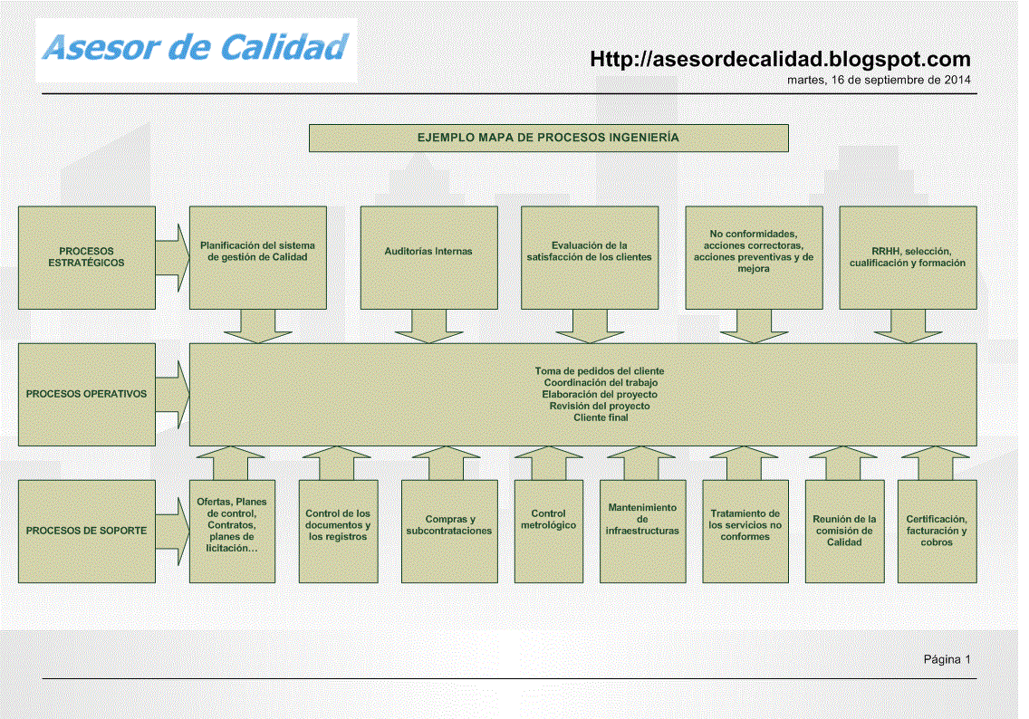 Modelo de mapa de procesos estructurados como procesos estratégicos, operativos y de apoyo os lo recomiendo por su sencillez.